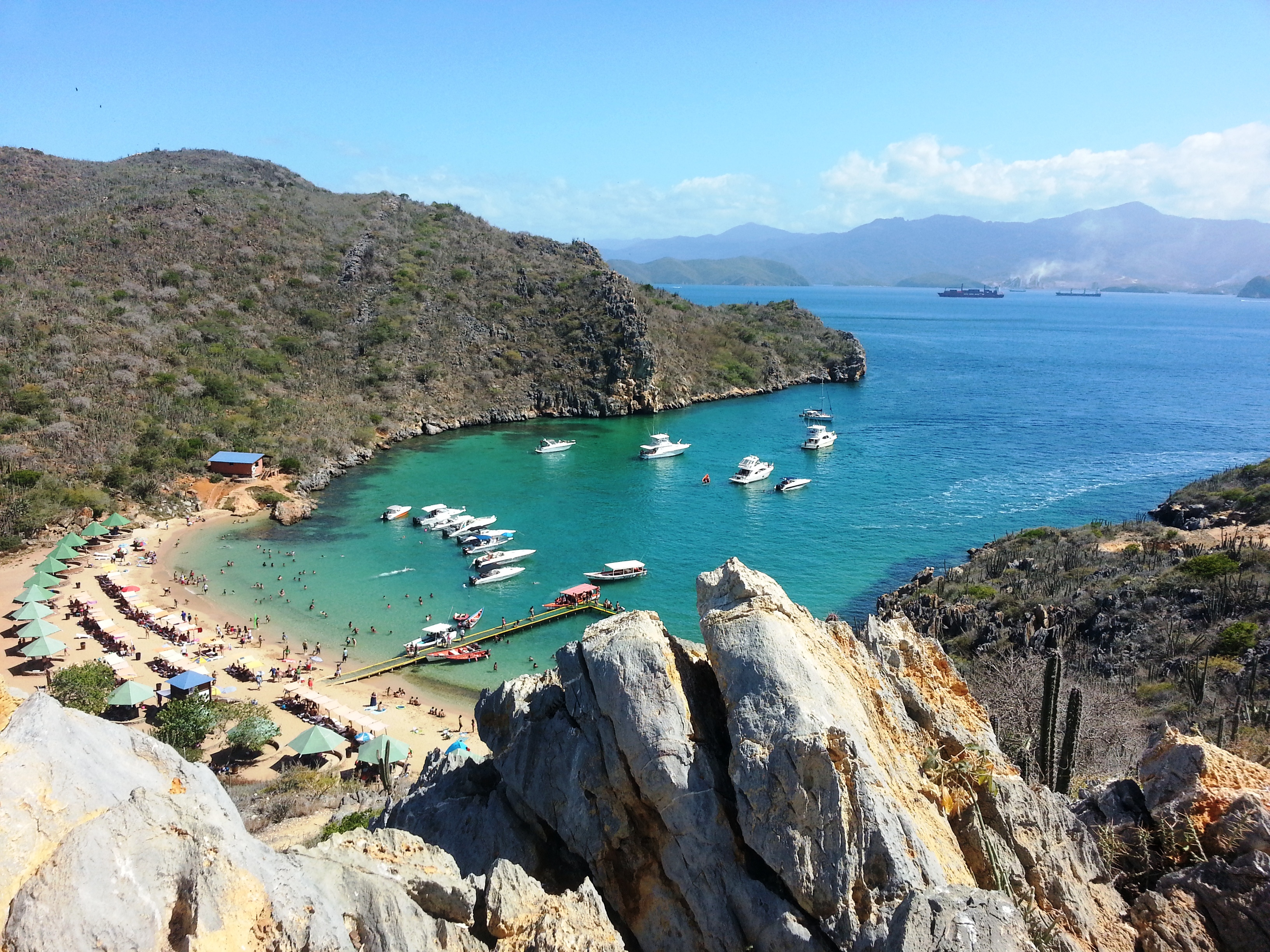 Isla El Faro